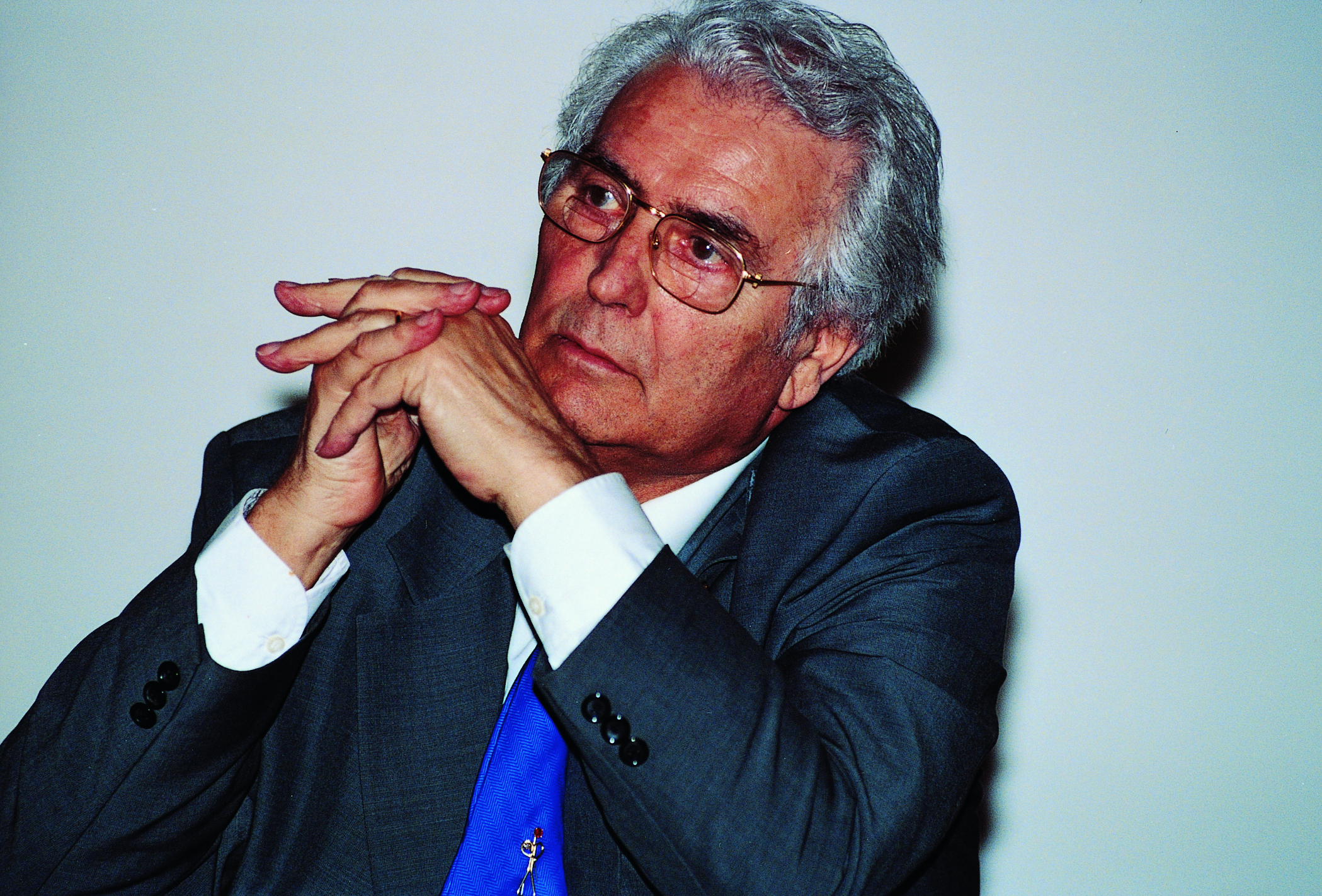 Foto scattata all'Accademia di Belle Arti di Venezia